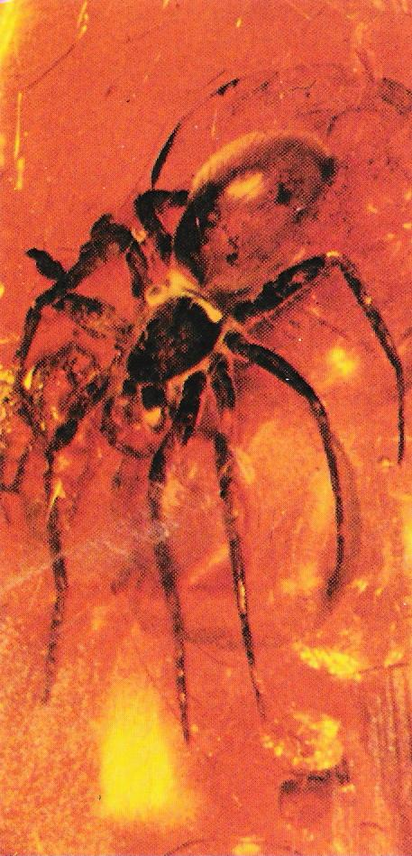 Fossil Spider in Amber